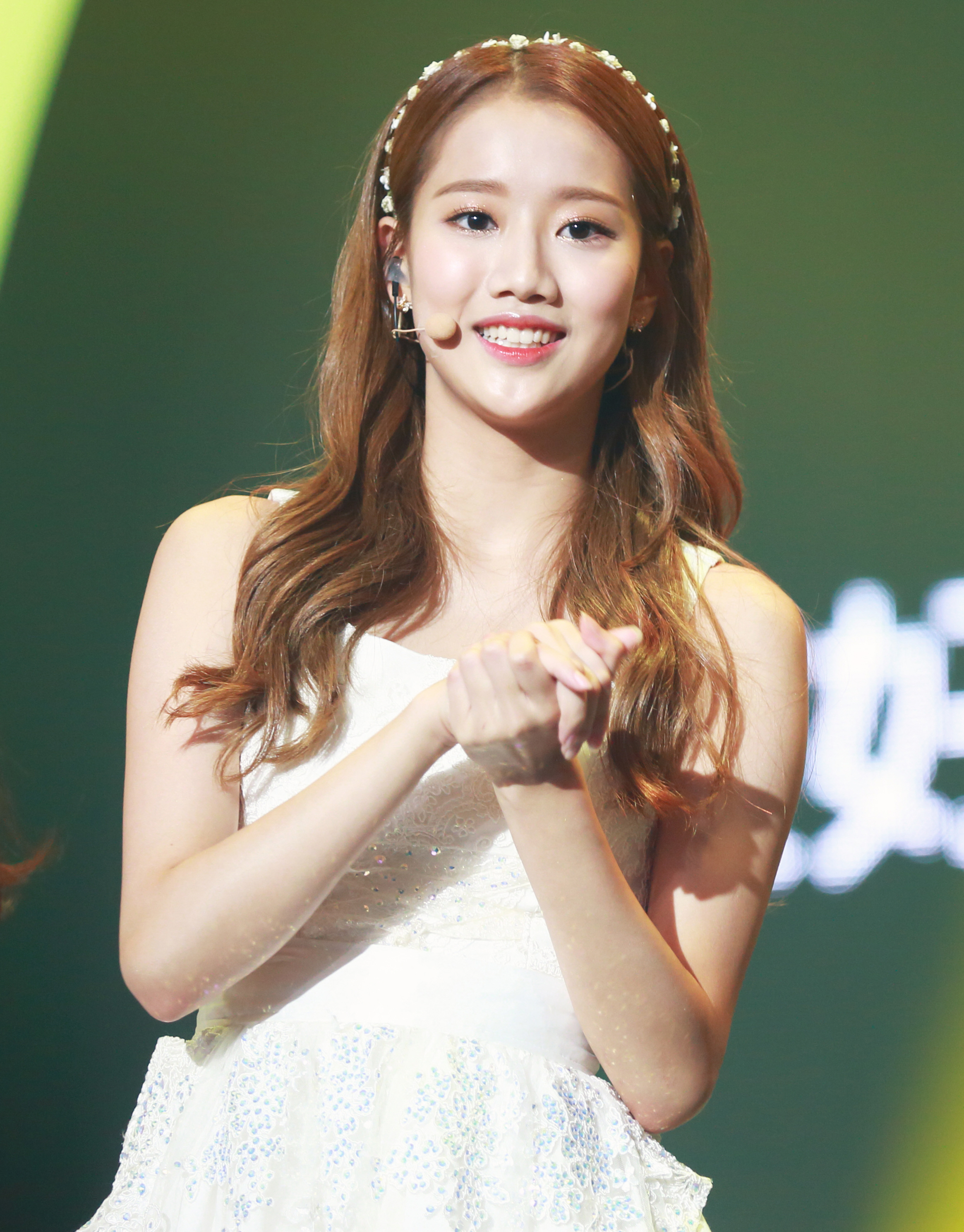 160903 台灣 대만 MTV 최강음 콘서트 (에이프릴) 찍직 Part.1